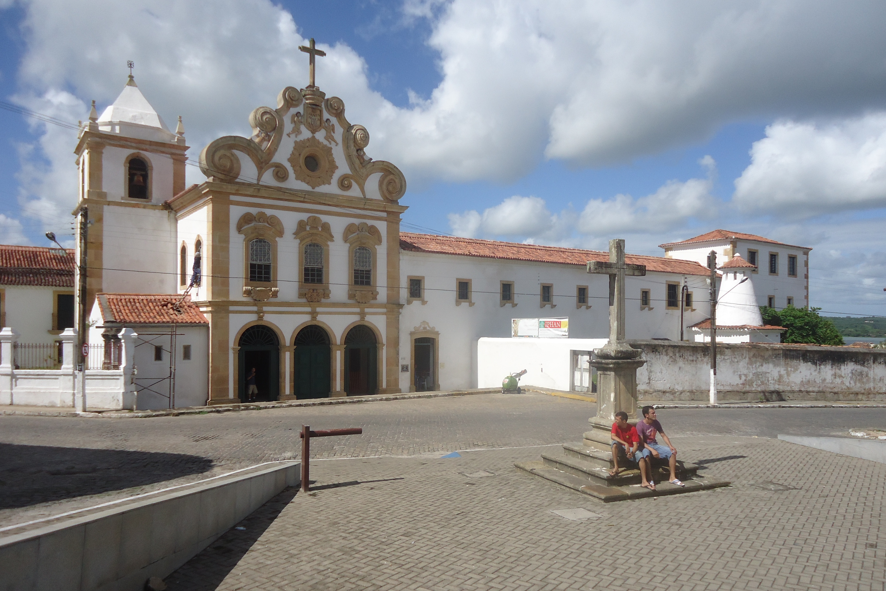 Imagem da Igreja Santa Maria dos Anjos e do Convento de São Francisco da cidade de Penedo, estado de Alagoas Brasil — Patrimônio histórico do Brasil.